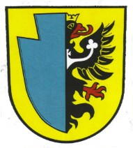 Čermná ve Slezsku